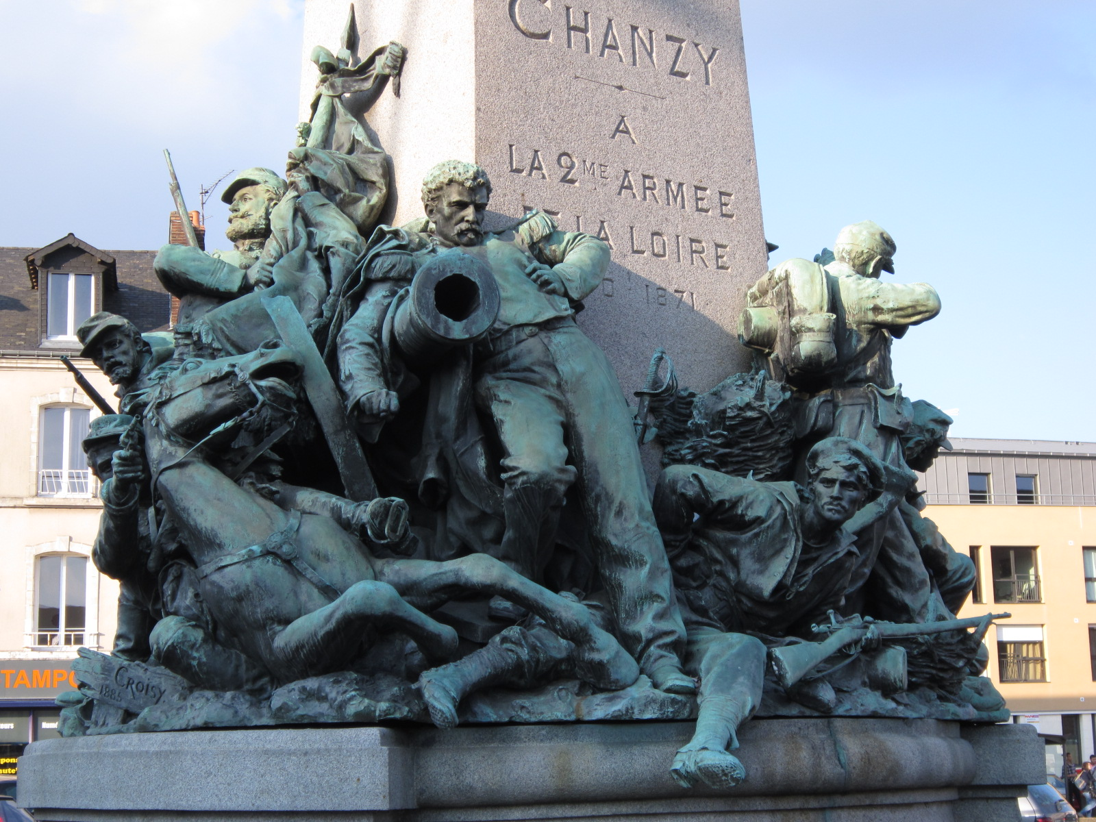 Statue du général Chanzy (bas) par le scupteur Croisy, au Mans (72)